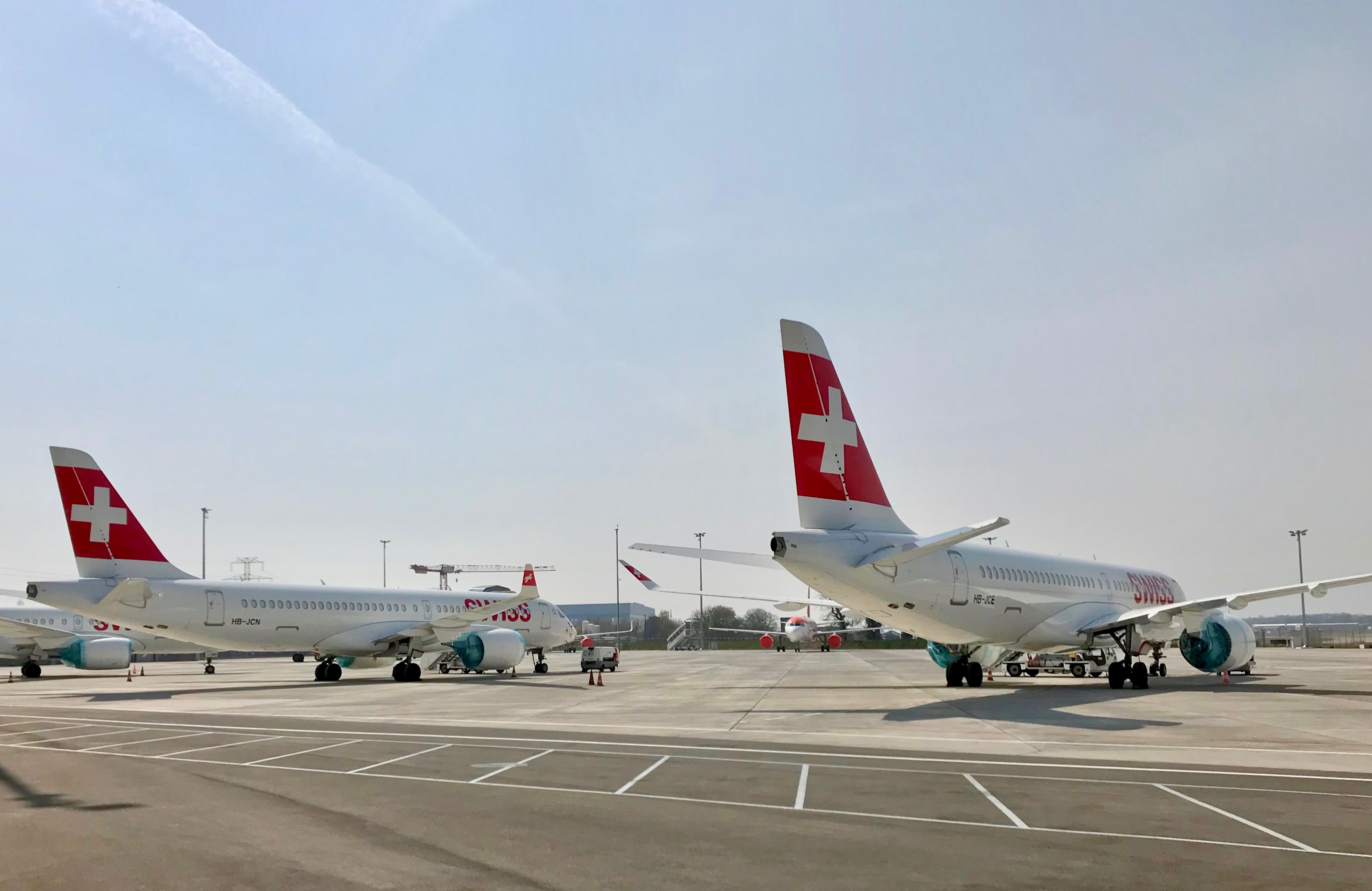 Les avions de la compagnie Swiss cloués au sol à l'Aéroport international de Genève-Cointrin à cause de la pandémie du COVID-19.